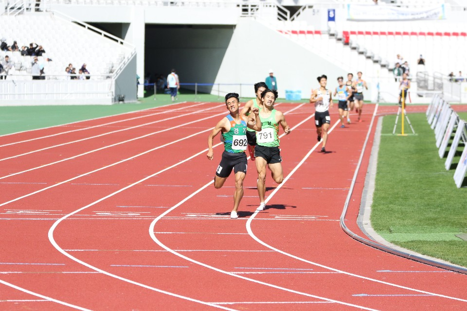 육상선수 이강철